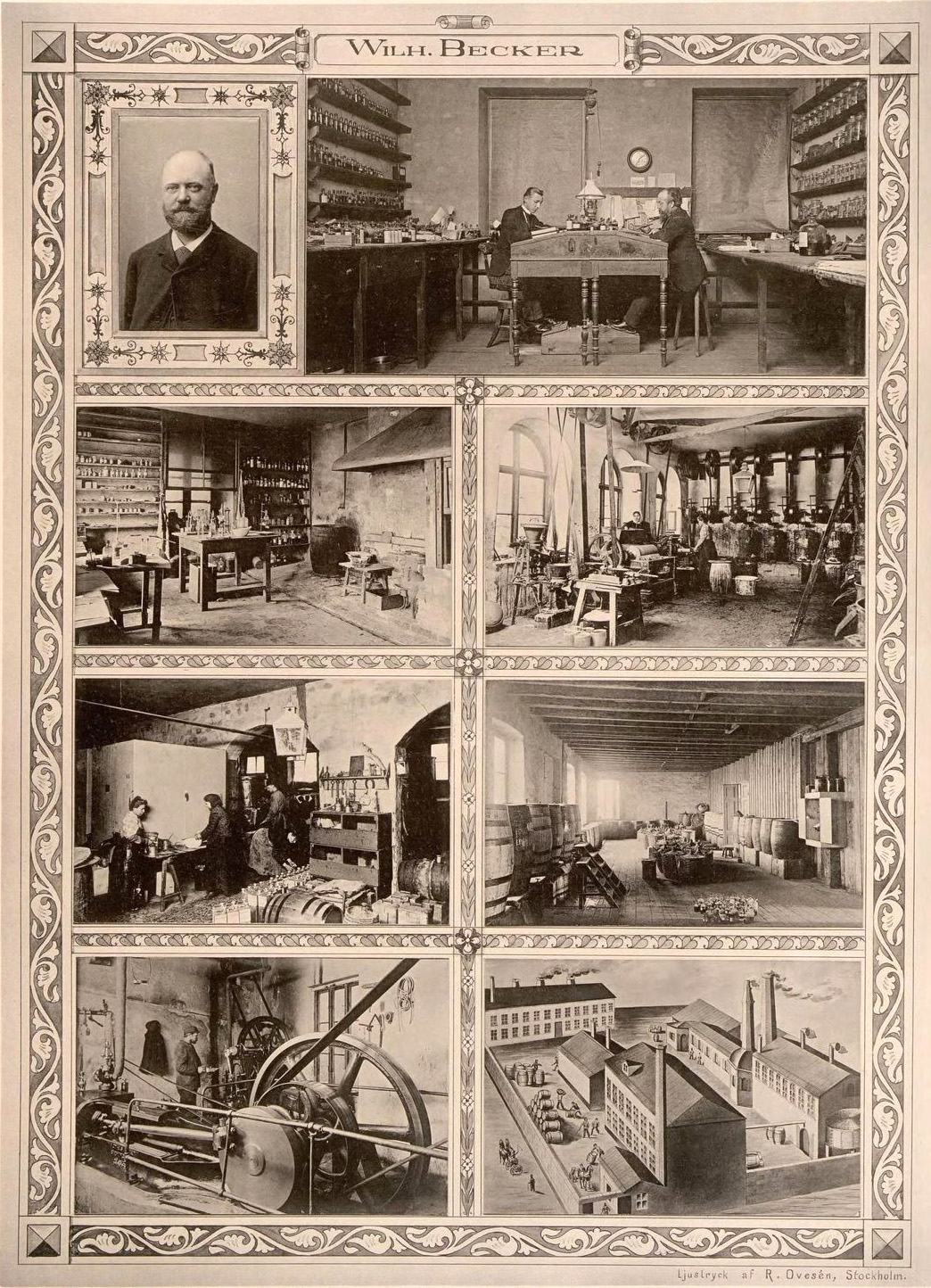 Wilhelm Becker